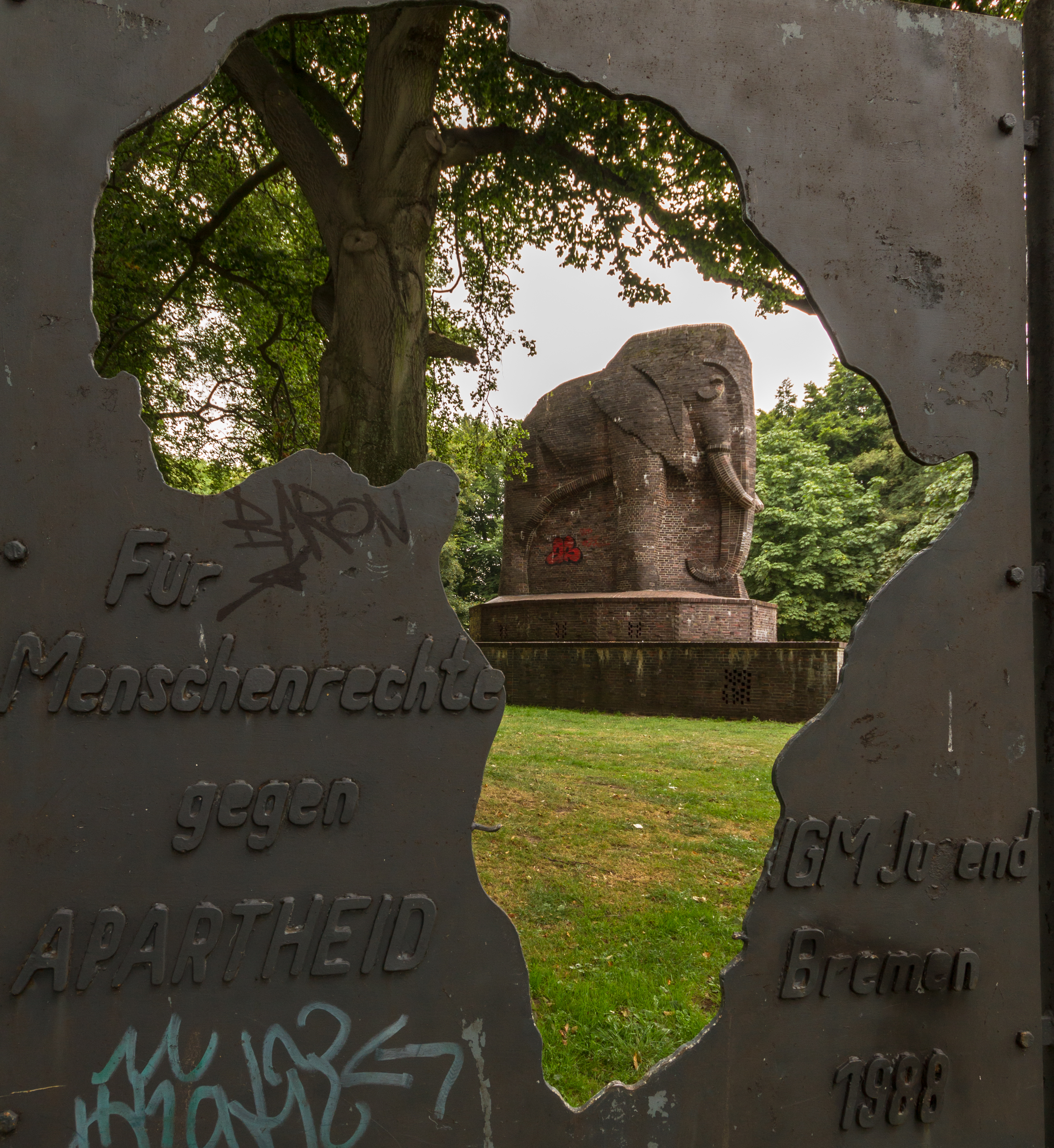 Kolonial-Ehrenmal, Anti-Kolonial-Denk-Mal in Bremen, Gustav-Deetjen-AlleeDas abgebildete Objekt ist ein geschütztes Kulturdenkmal in der Freien Hansestadt Bremen, mit der Nr. 1771 beim Landesamt für Denkmalpflege registriert.